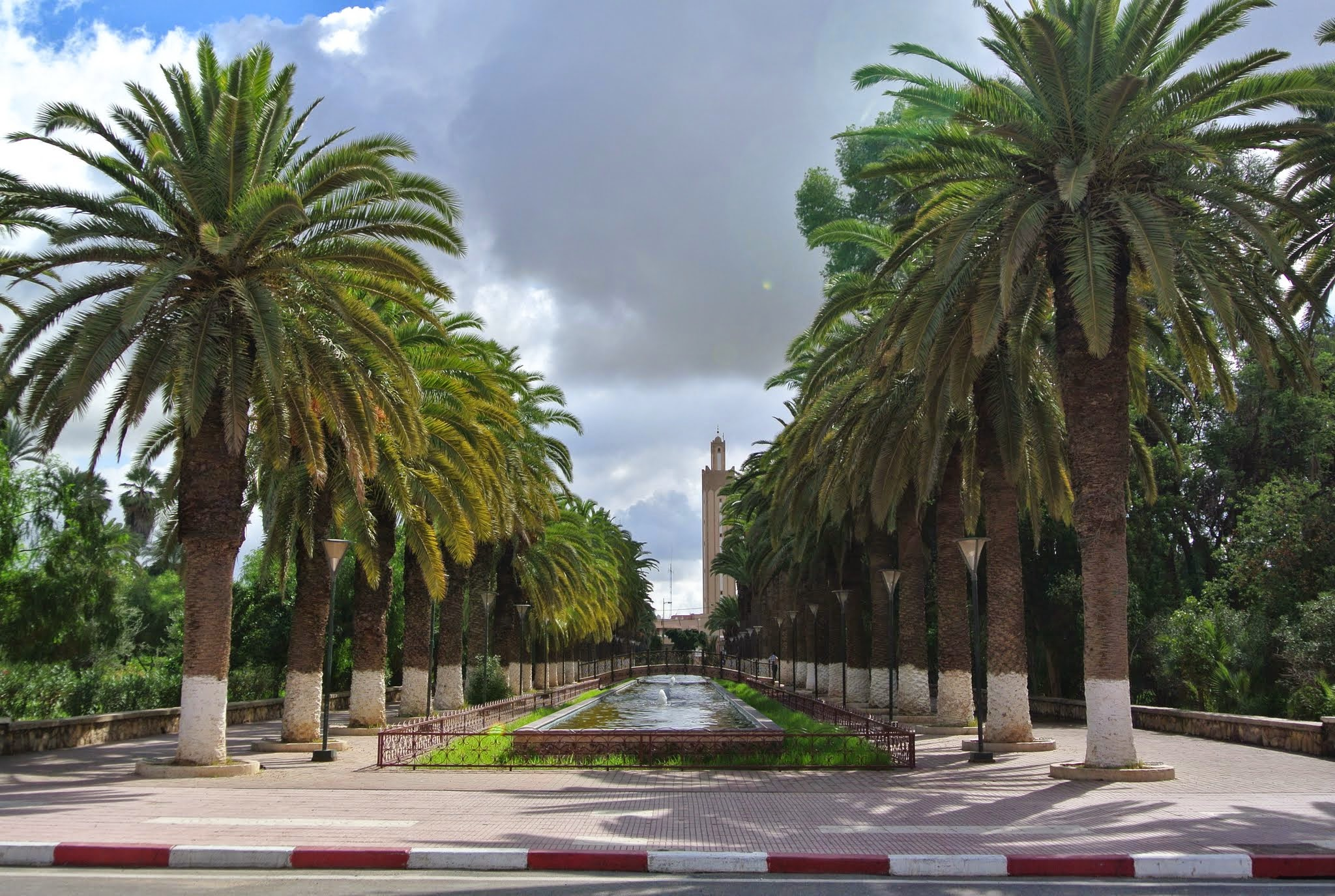 Al Kassbah, Taroudant, Morocco